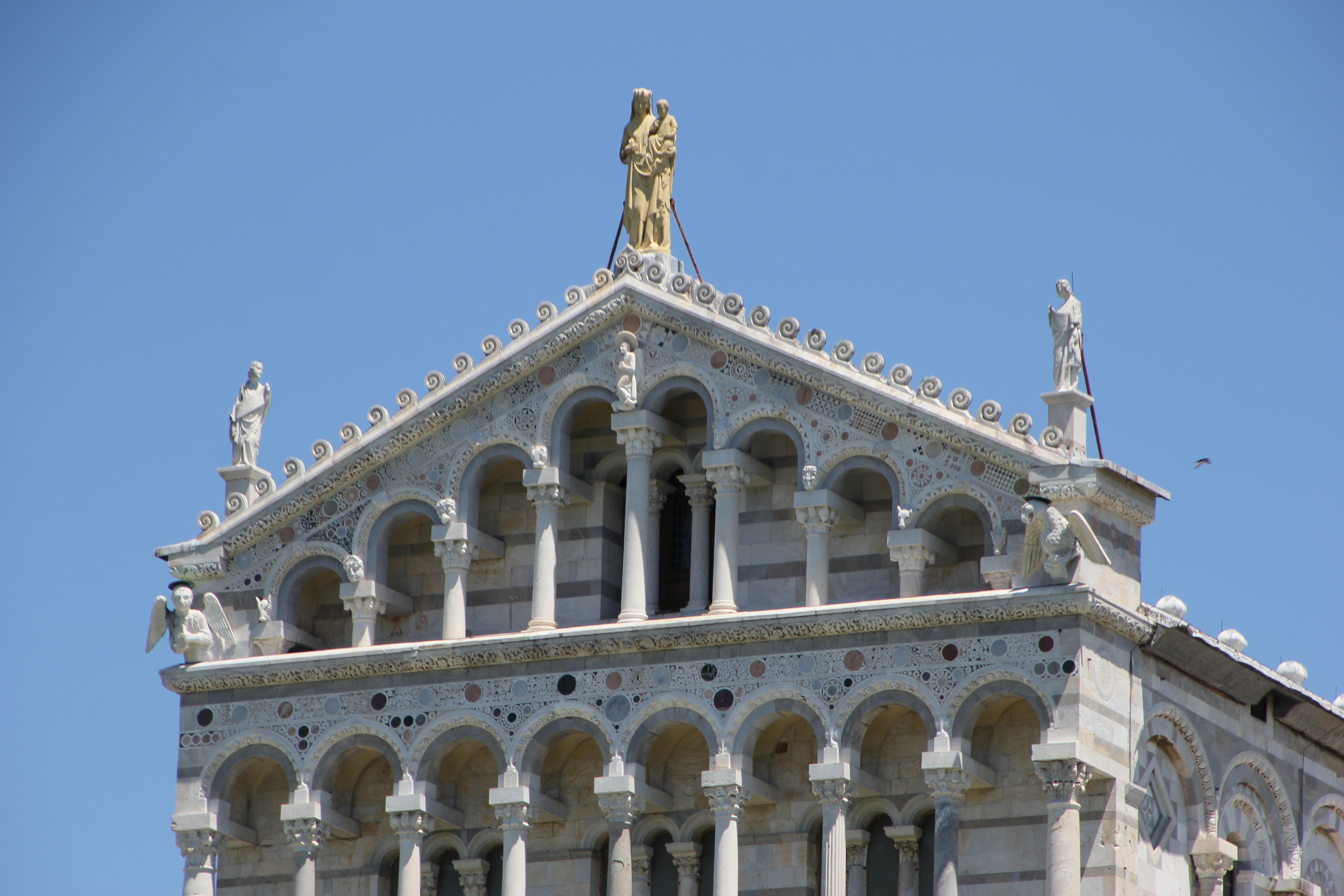 Pisa, cattedrale di Santa Maria Assunta